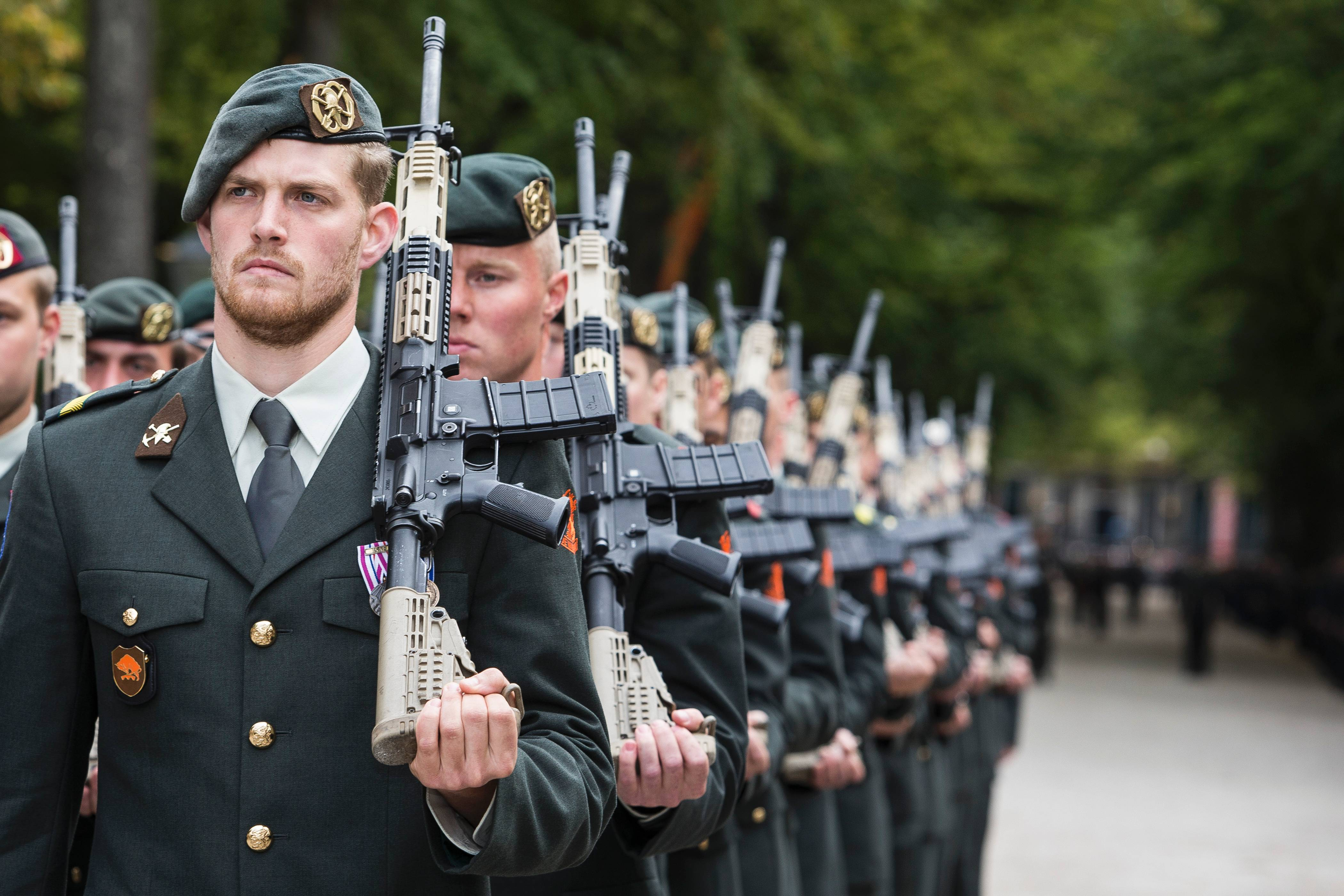 De 3e dinsdag in september en groot militair ceremonieel horen bij elkaar. Aan de plechtigheden op Prinsjesdag doen meer dan 2.000 Defensiemedewerkers mee. Op deze pagina krijgt u een indruk van de ceremoniële ondersteuning die Defensie levert voor Prinsjesdag.